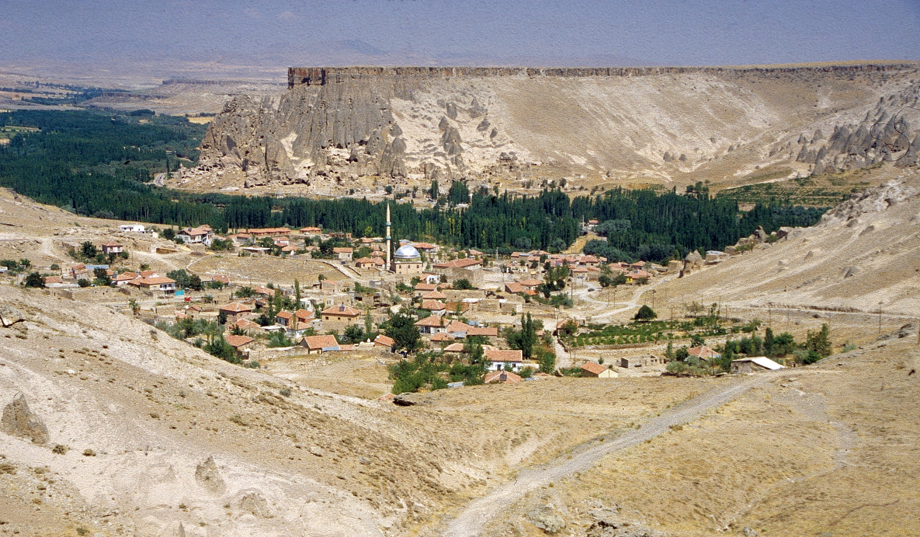 Selime, türkischer Ort in Kappadokien mit Höhlenkloster